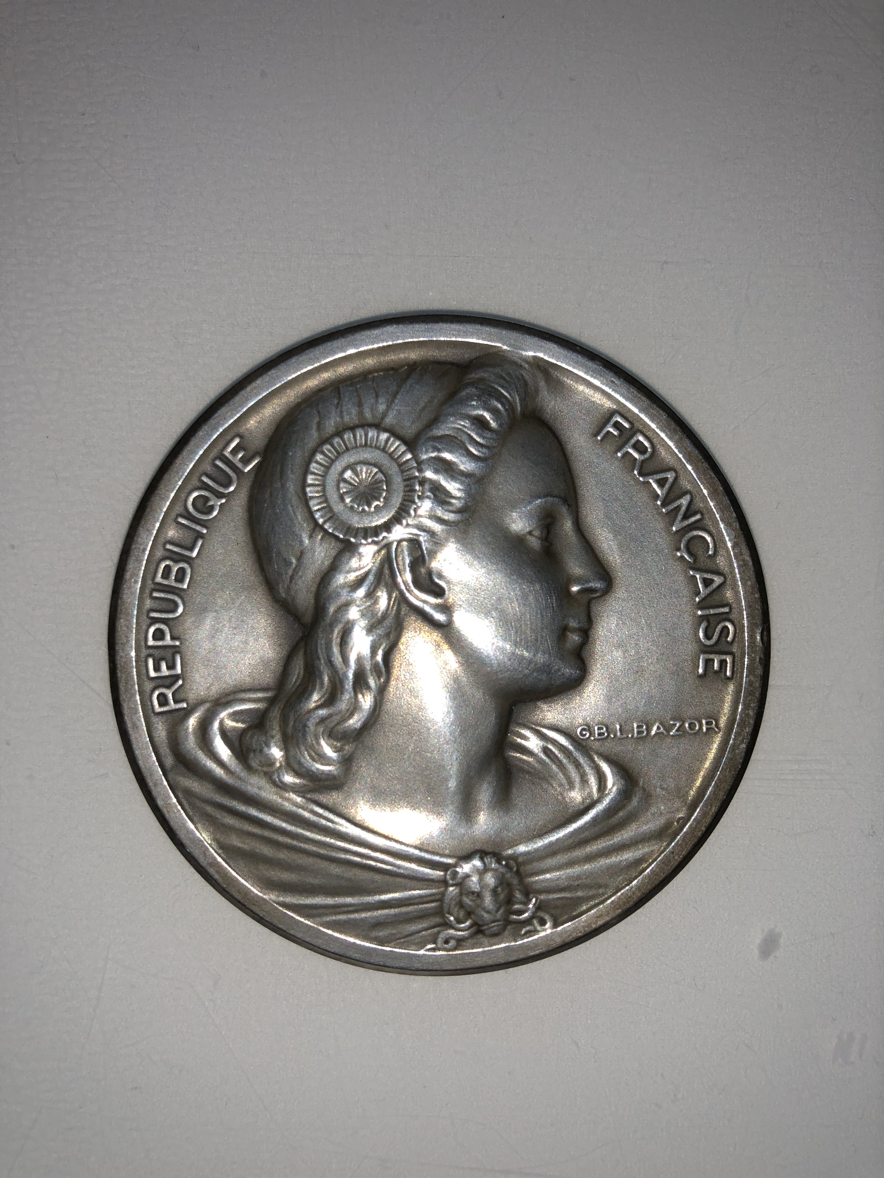 Médaillon de la République Française attestant de son élection en tant que député du Finistère en 1951.